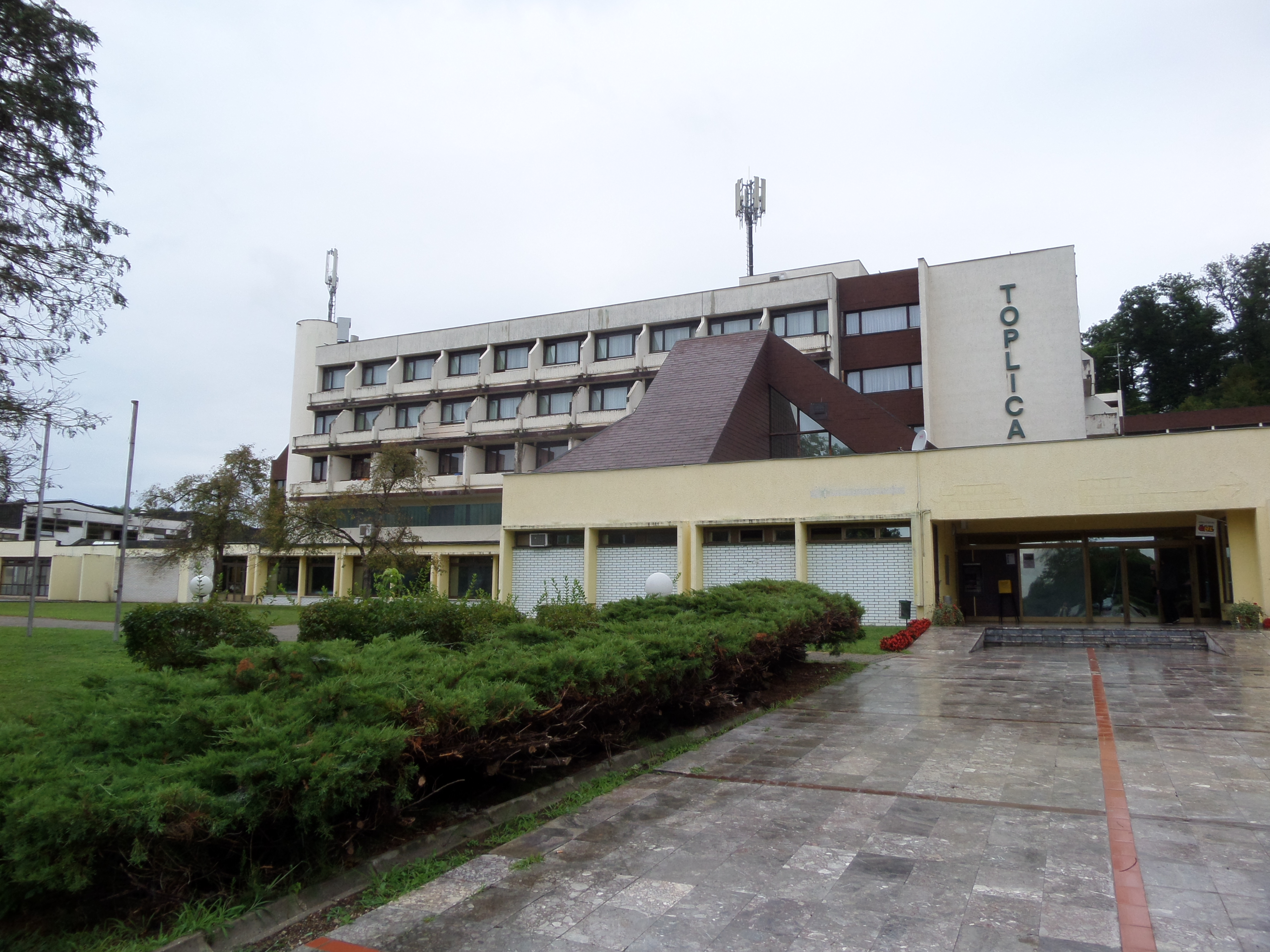 11.08.2016. - 44415, Topusko, Kroatien